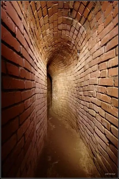 Пещеры Бузулукского Спасо-Преображенского монастыря. Одна из подземных галерей